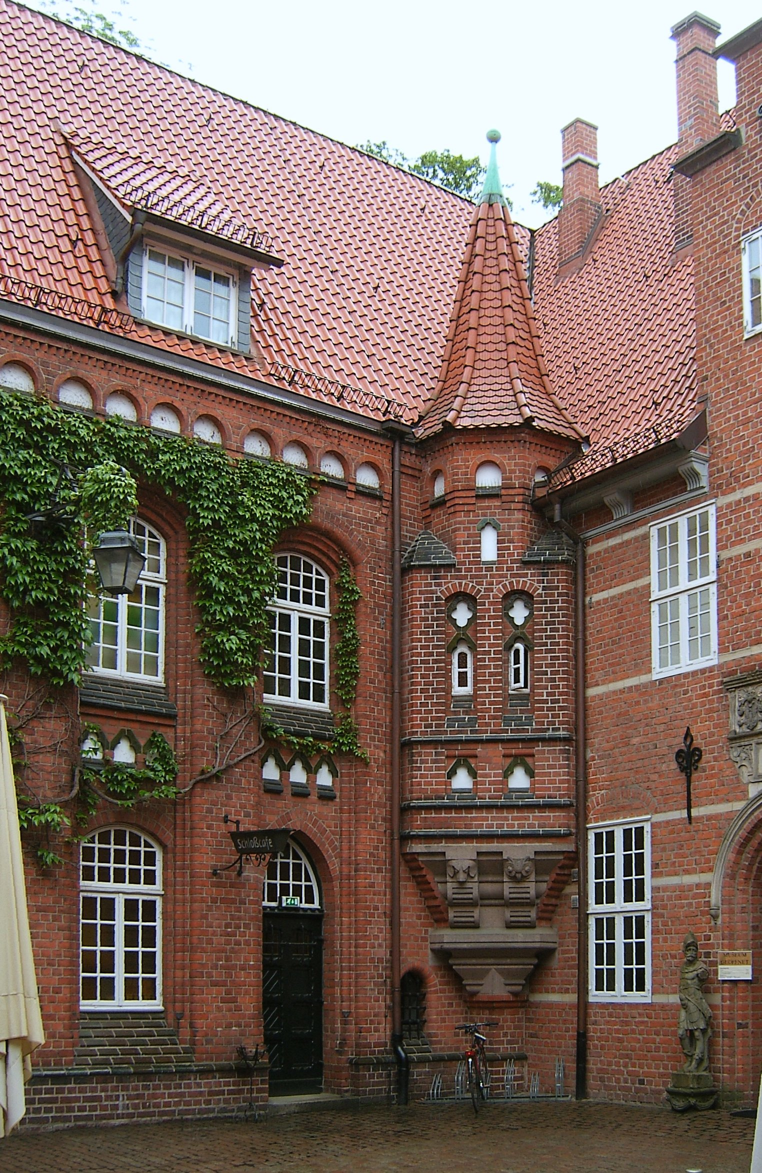 Innenhof des Bergedorfer Schlosses im gleichnamigen Hamburger Stadtteil.